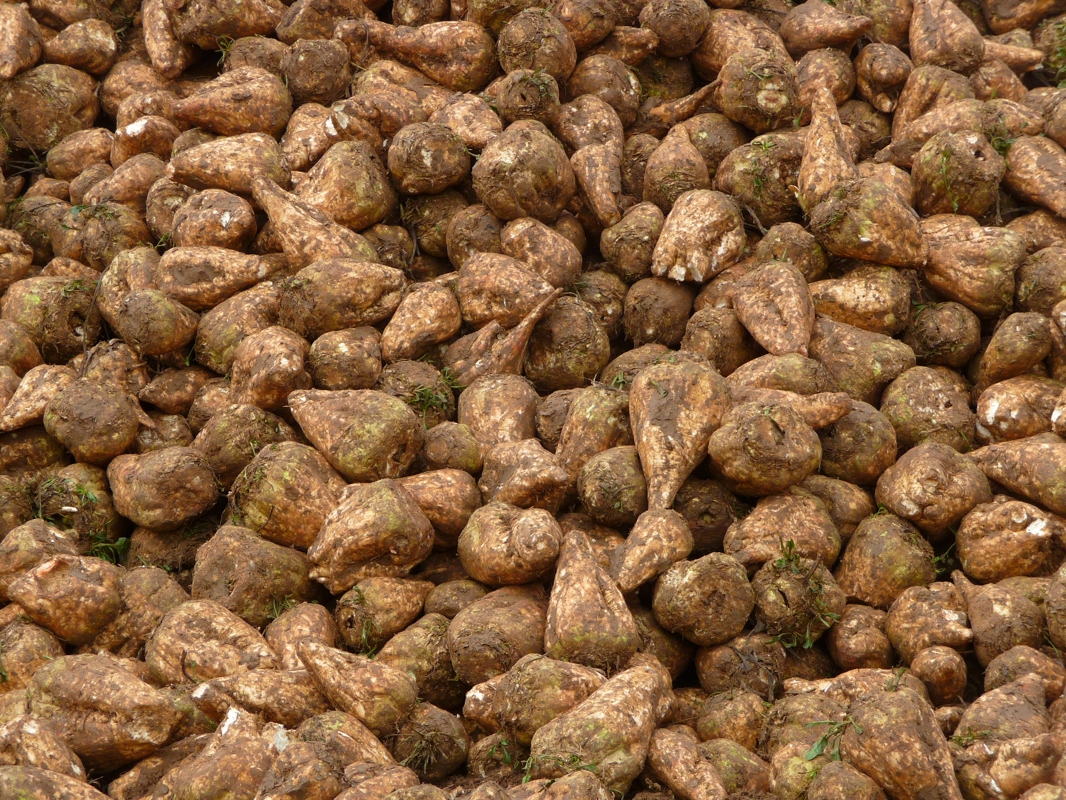 Berg Zuckerrüben (Beta vulgaris), fotografiert im Rhein-Neckar-Kreis (Baden-Württemberg, Deutschland)